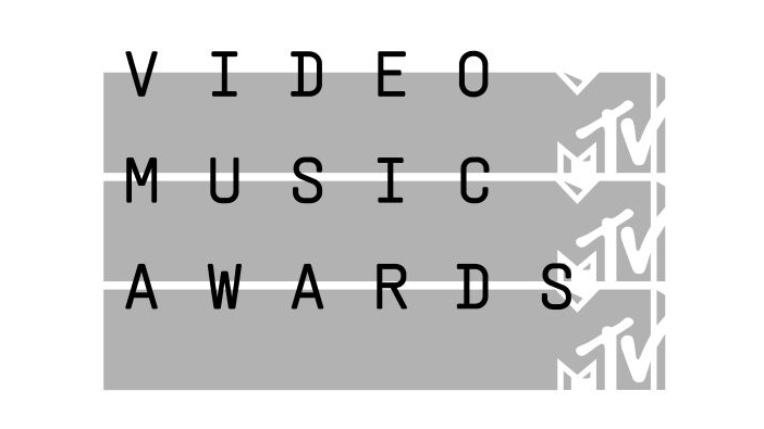 Logotipo de la edición 2015 de los MTV VMA presentados por Miley Cyrus desde Los Ángeles.